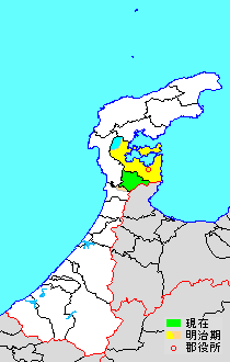 Ishikawa Kashima-gun